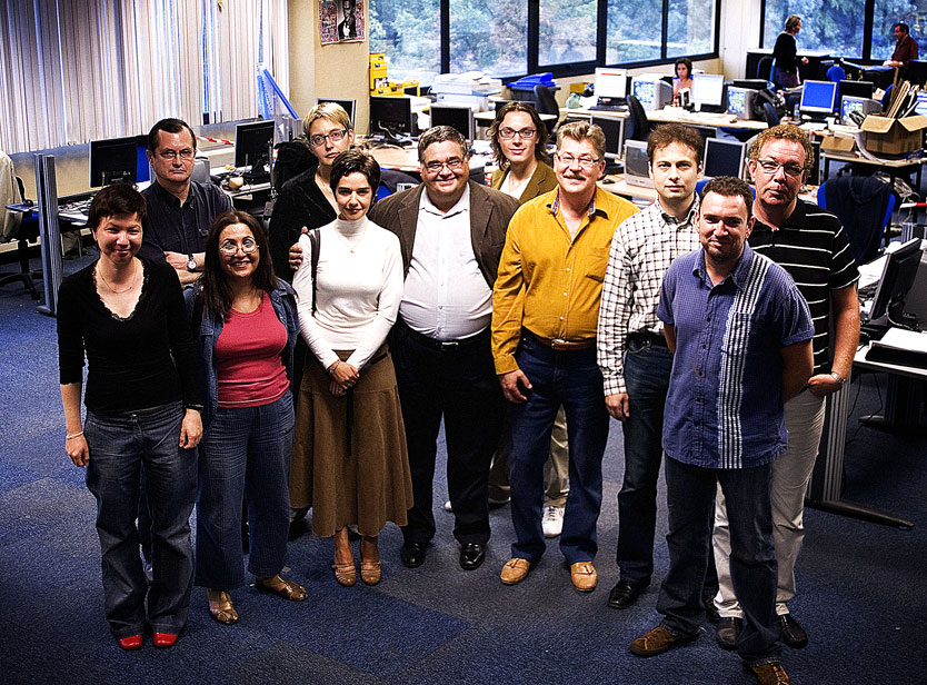 Большинство постоянных журналистов русской редакции EuroNews